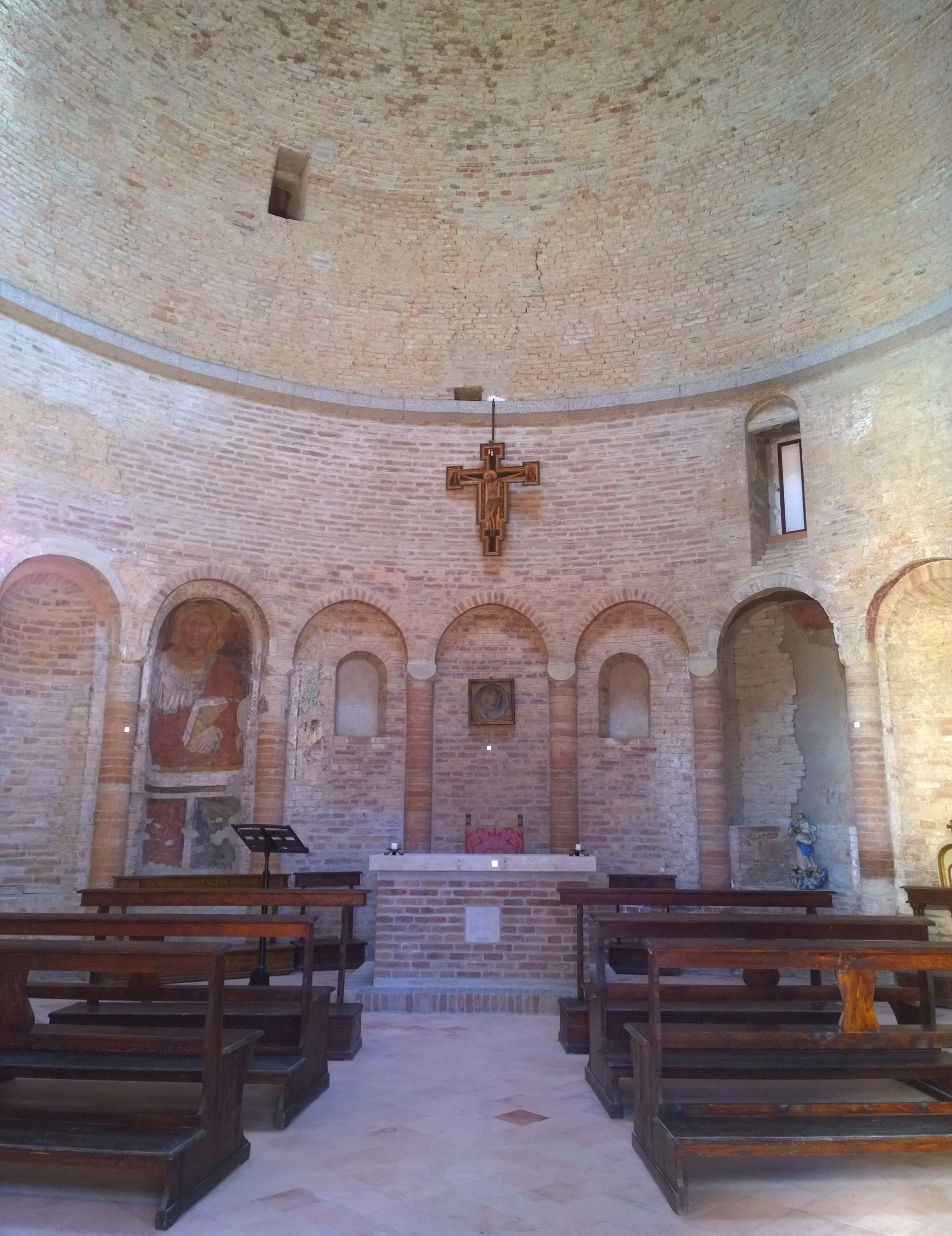 Bologna. Rotonda della Madonna del Monte vista dall'ingresso.